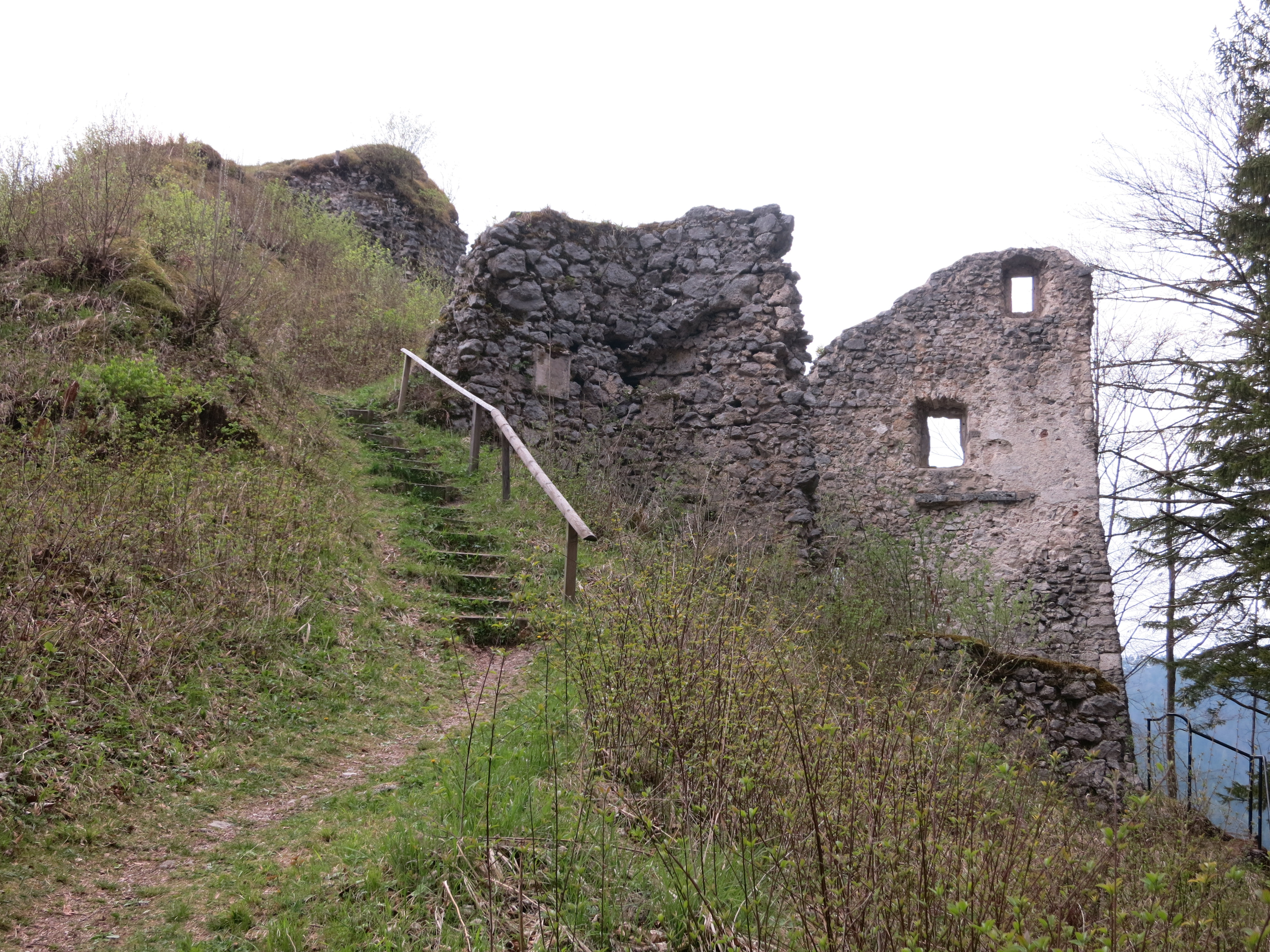 Ansicht der Ruine Hohenberg vom Haupteinang aus (2012)